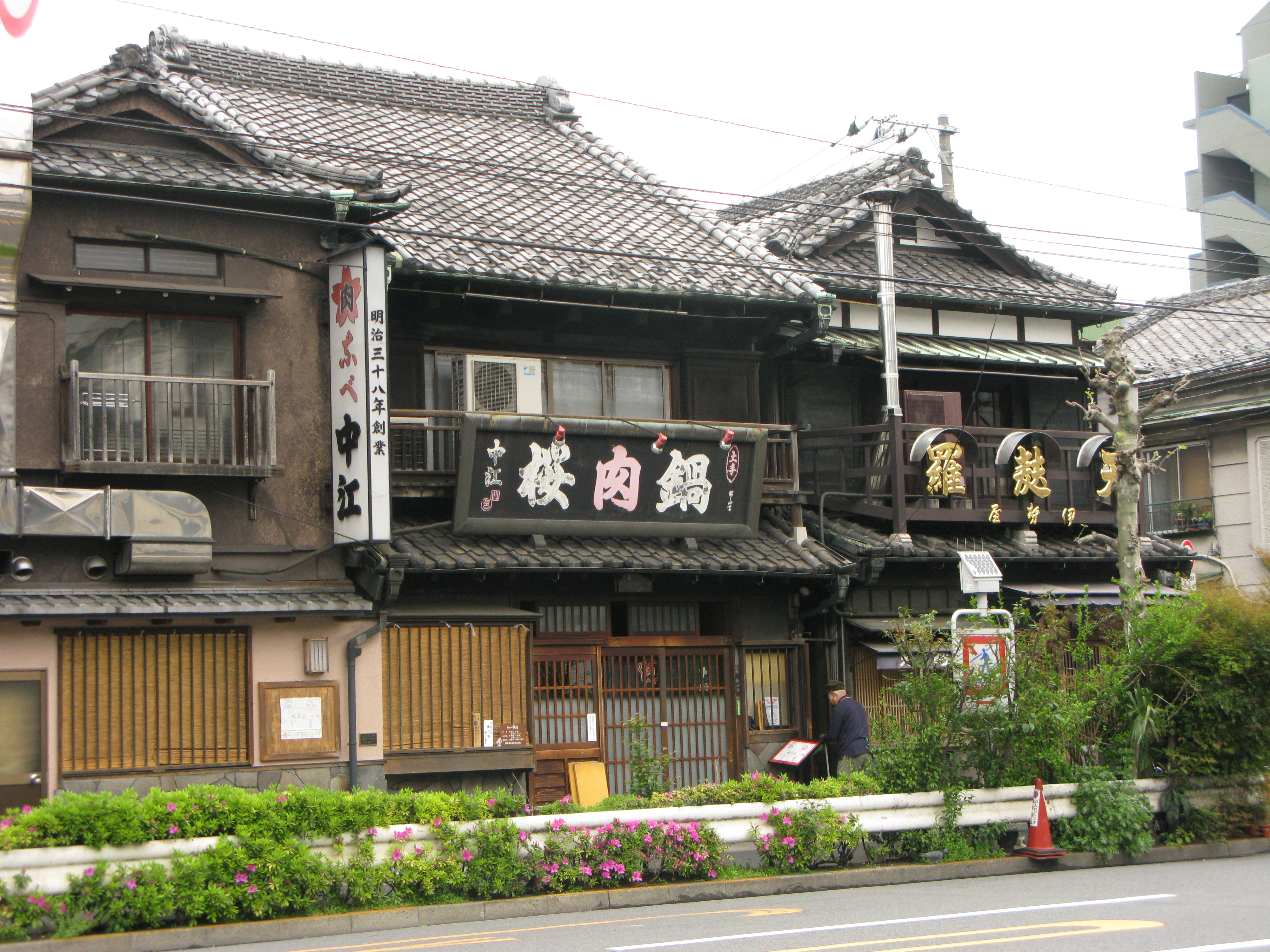 馬肉料理店（東京・台東区日本堤1-9-2、三ノ輪駅最寄りの馬肉料理の老舗「創業明治三十八年 浅草吉原 桜なべ中江」[1]）